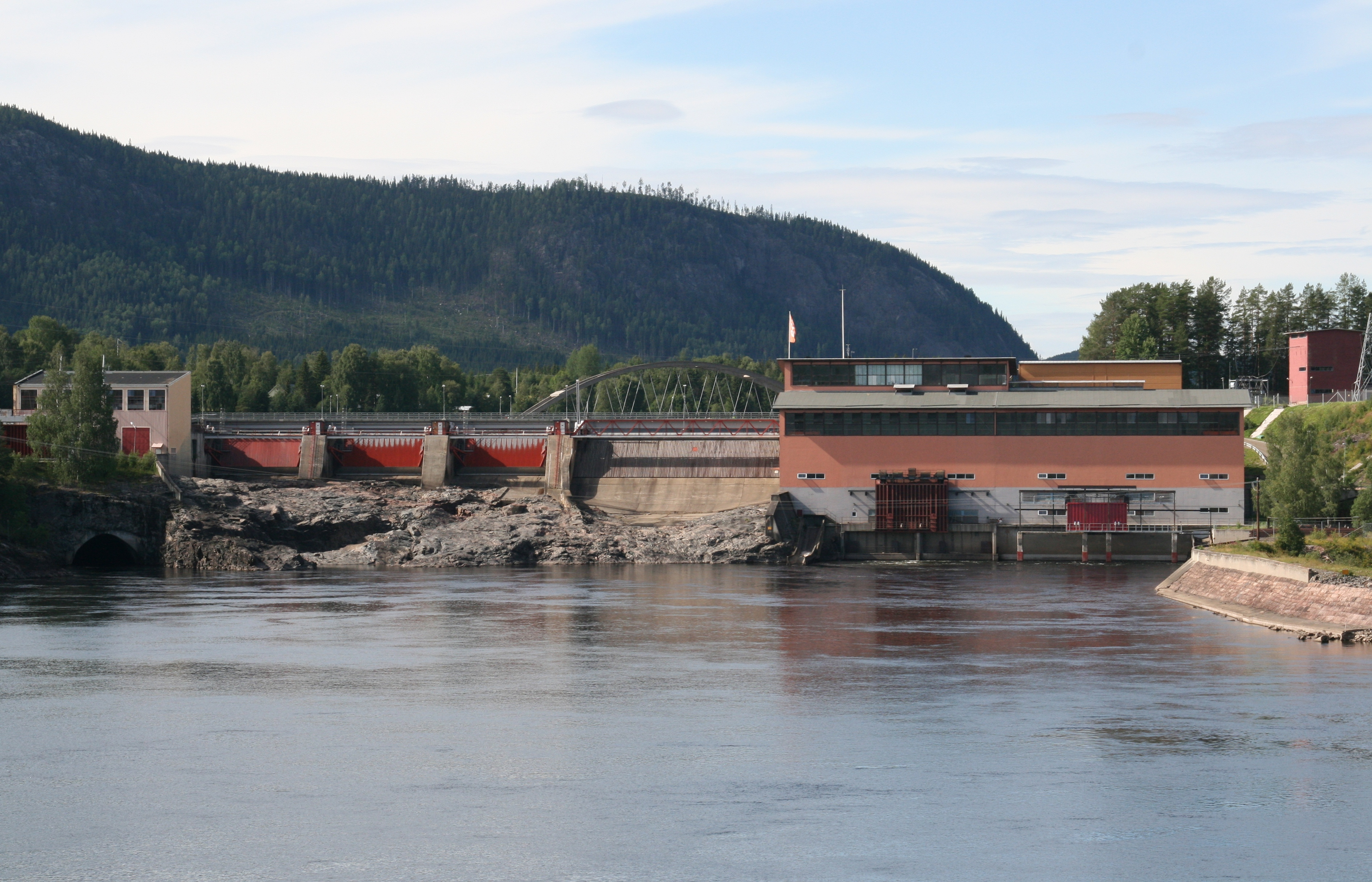 Hammarforsens powerplant in Indalsälven near Hammarstrand, Sweden